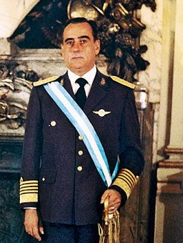 Orlando Ramón Agosti en 1978. Miembro de la Junta Militar (1976-1979)